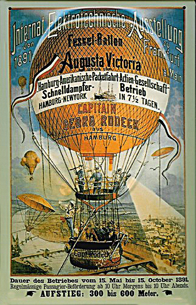 Poster zu Rundflügen anlässlich der Internationalen Elektrotechnischen Ausstellung in Frankfurt am Main 1891